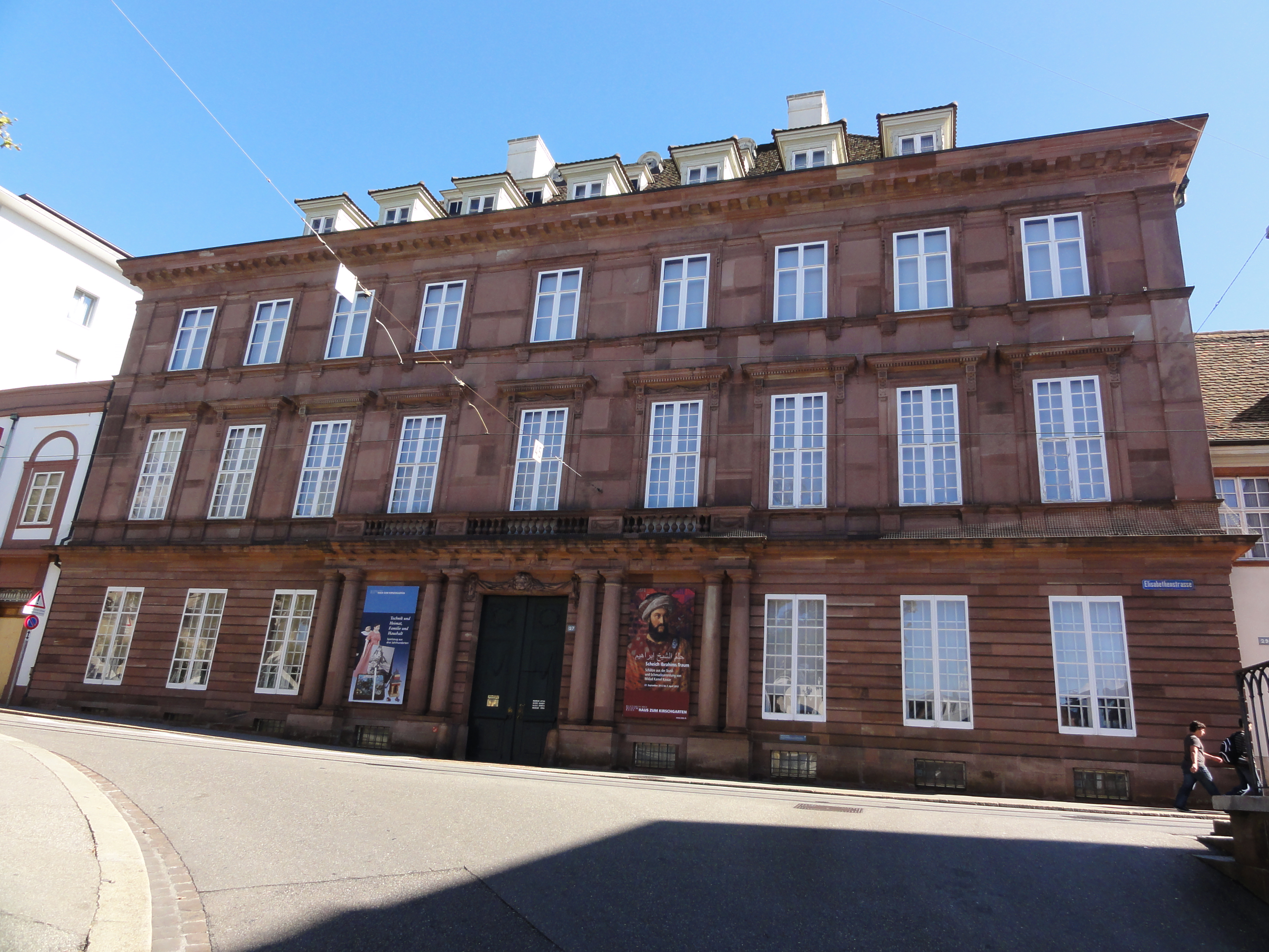 Basel — Haus zum Kirschgarten